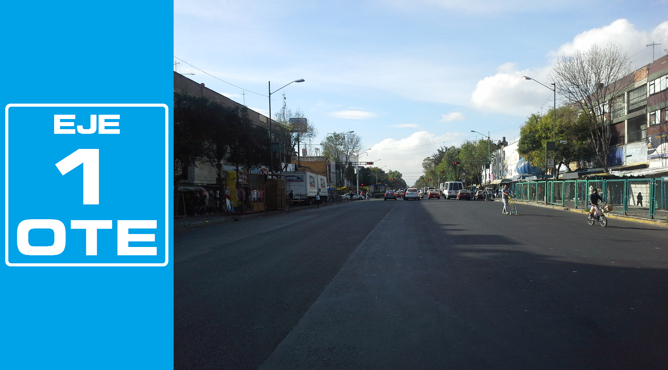 Rediseñado original de la señalética de los Ejes viales de la Ciudad de México por José García (Wiki ID: narumiyama)